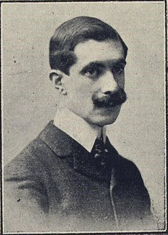 Joaquín Otamendi.